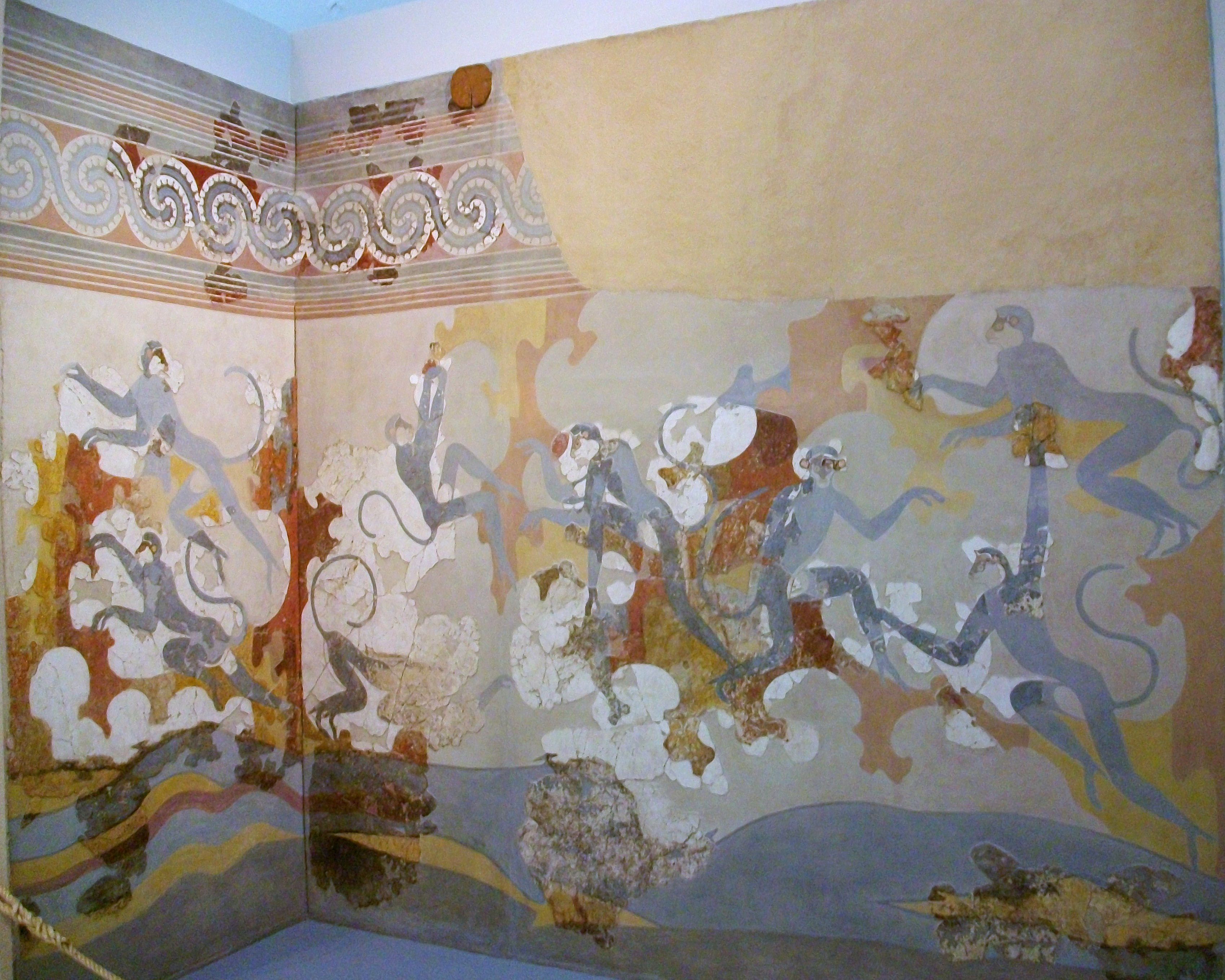 Fresc dels micos blaus, Akrotiri, segle 17 aC, Museu de la Prehistòria de Thira.